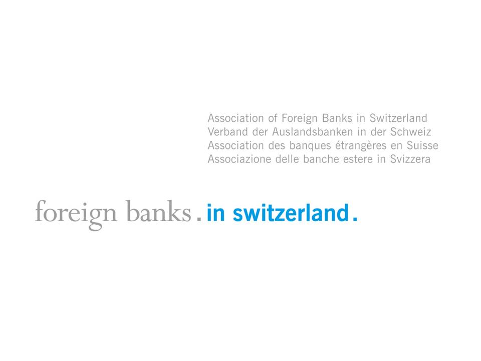 Viersprachiges Logo des Verbands der Auslandsbanken in der Schweiz